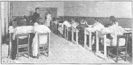 Clase de matemáticas, dada por una profesora (Institución Libre de Enseñanza), obra del fotógrafo Christian Franzen, recogido en la revista Alma Española.